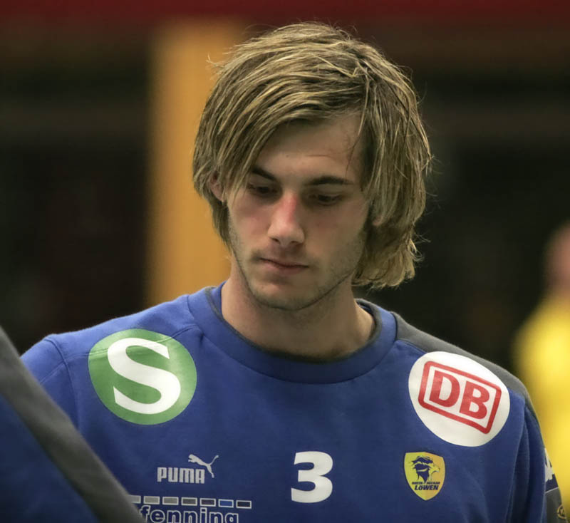 Uwe Gensheimer beim Aufwärmen vor dem Spiel gegen TuS Nettelstadt-Lübbecke am 18.11.2006 in der Bensheimer Weststadthalle